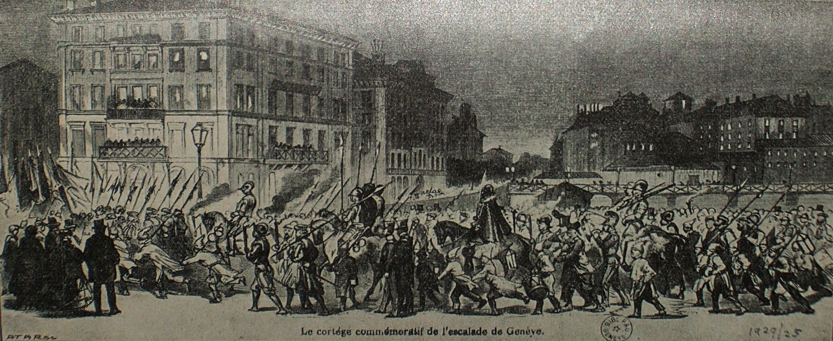 Gravure extraite du Monde illustré 4 janvier 1868. Dessin de Amédée Champod. "Le Cortège commémoratif de l'Escalade" en 1867 sur le pont des Bergues. En arrière plan, l'Hôtel de l'Écu, le pont de la Machine et le quartier de l'Île.